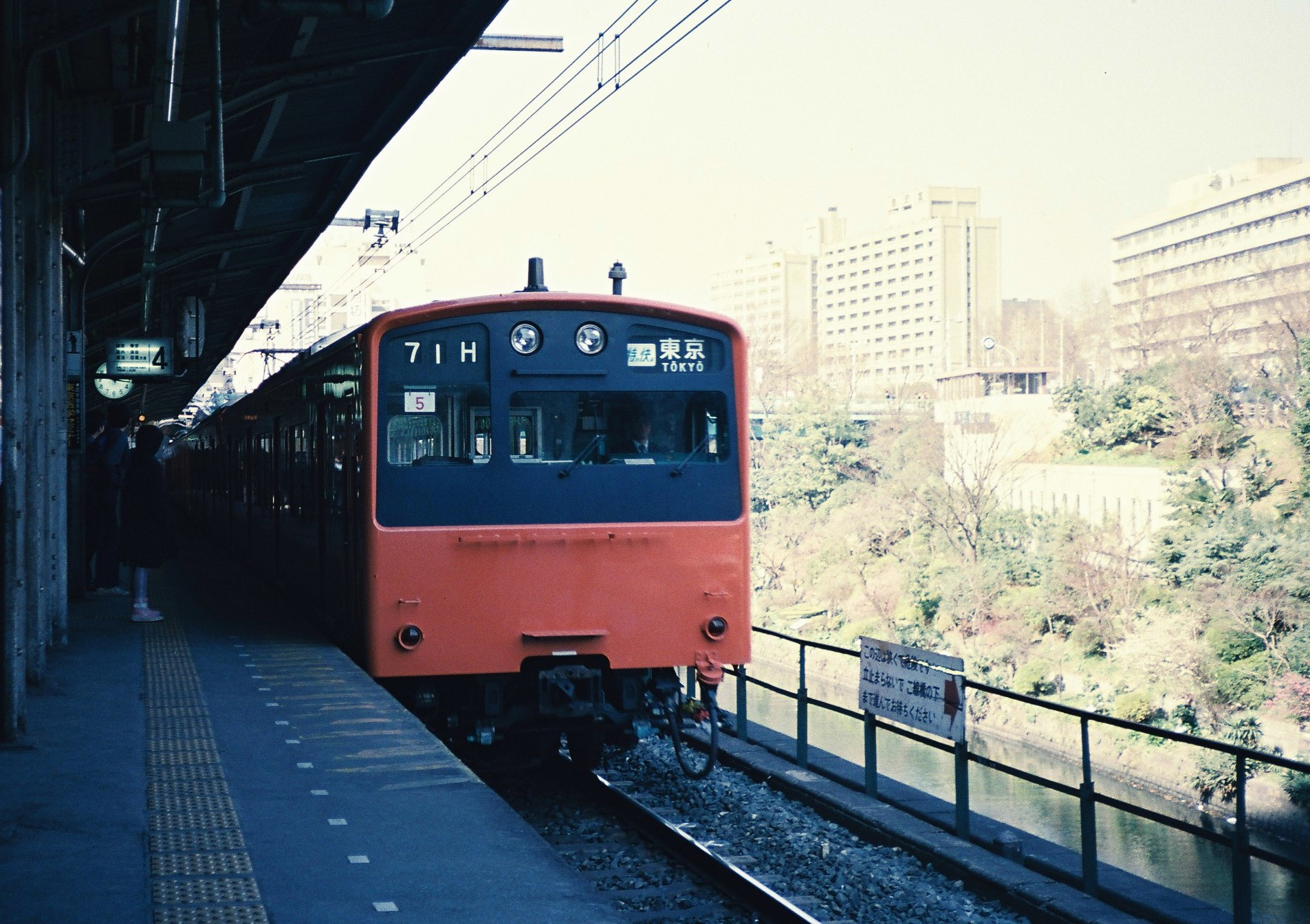 JR中央線特別快速201系（御茶ノ水駅、1987年2月撮影）